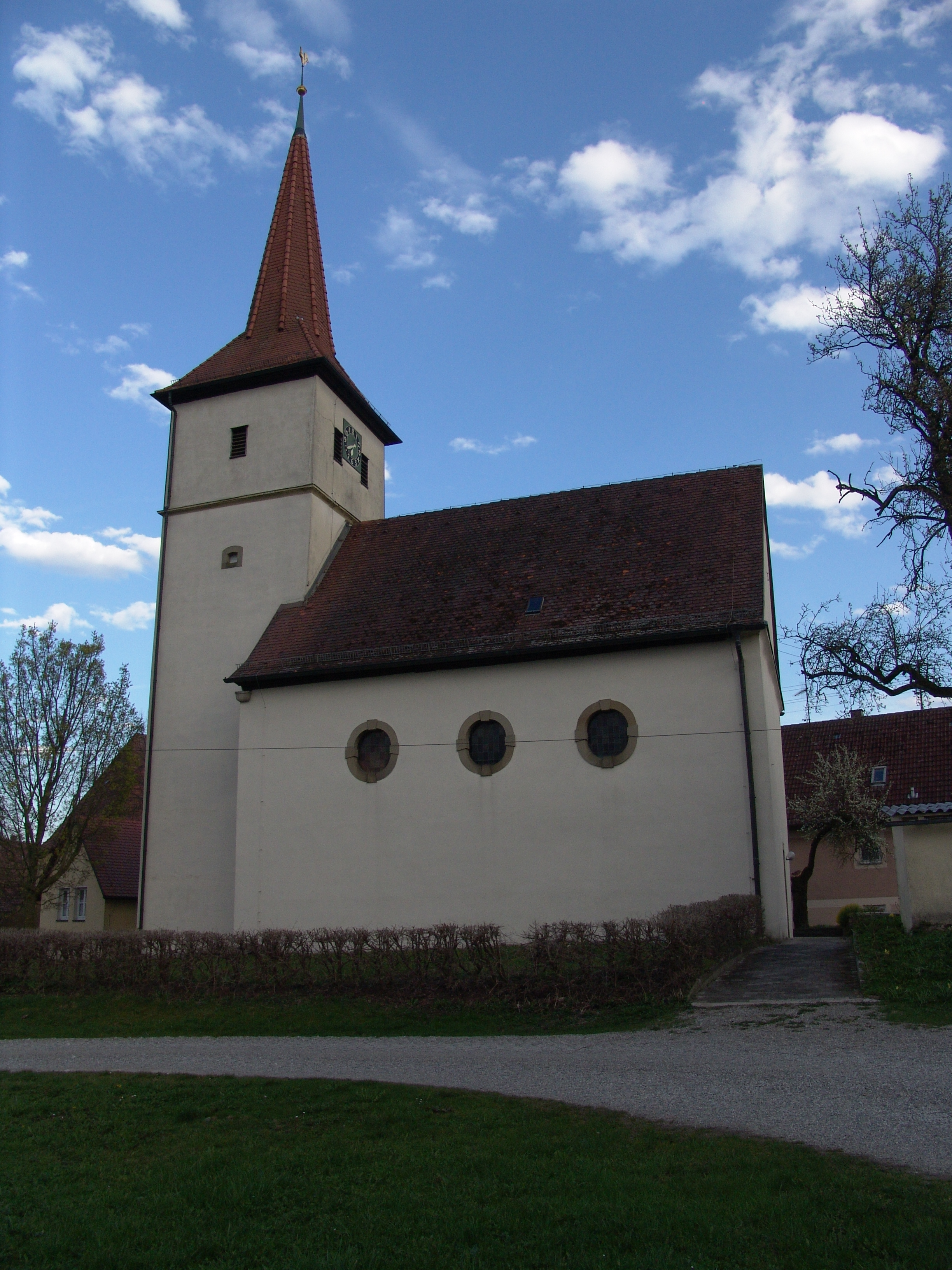 Michelbach an der Lücke, evang. Kirche St. Michael